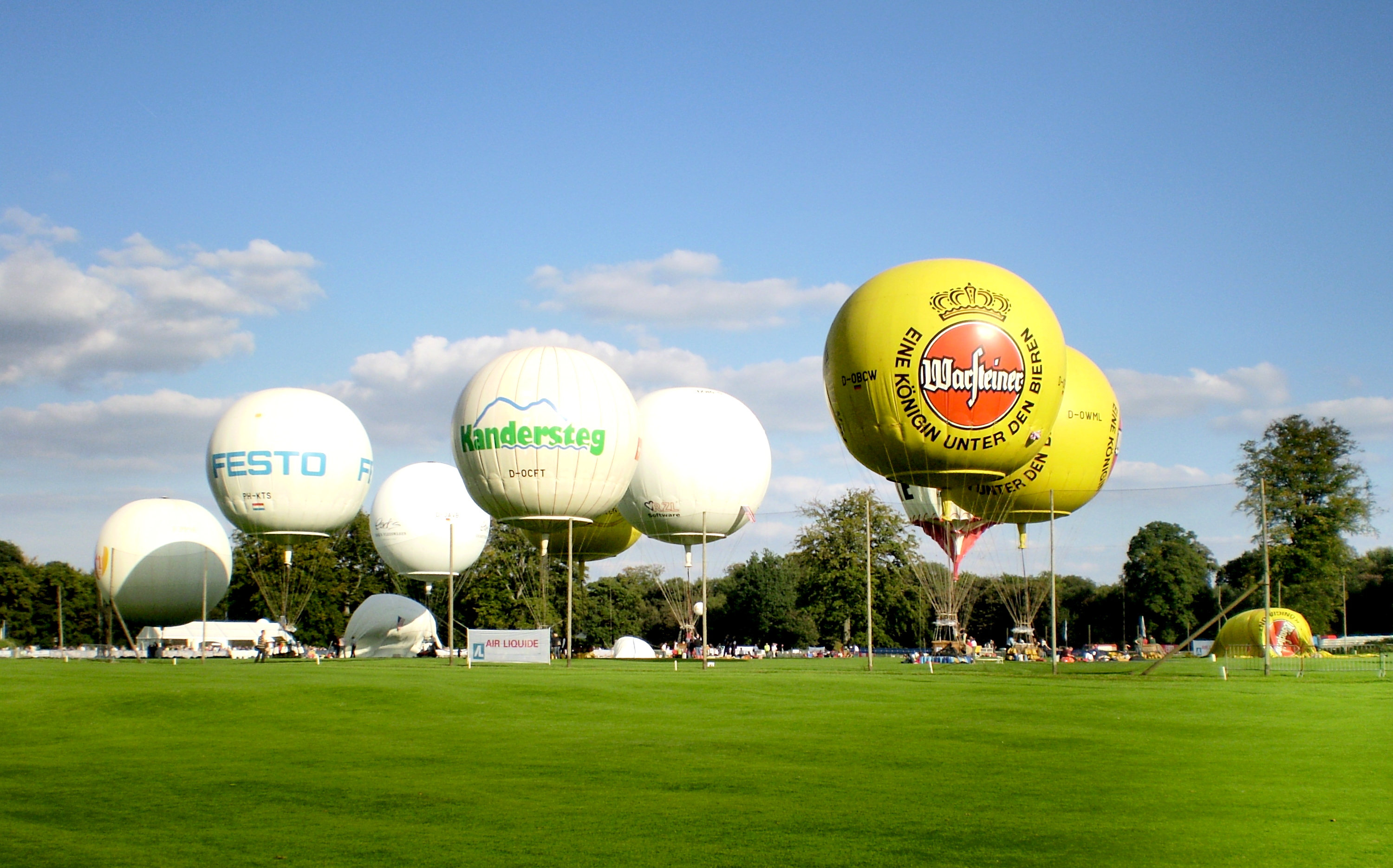 Coupe Aéronautique Gordon Bennett - préparation au départ des ballons - Bruxelles